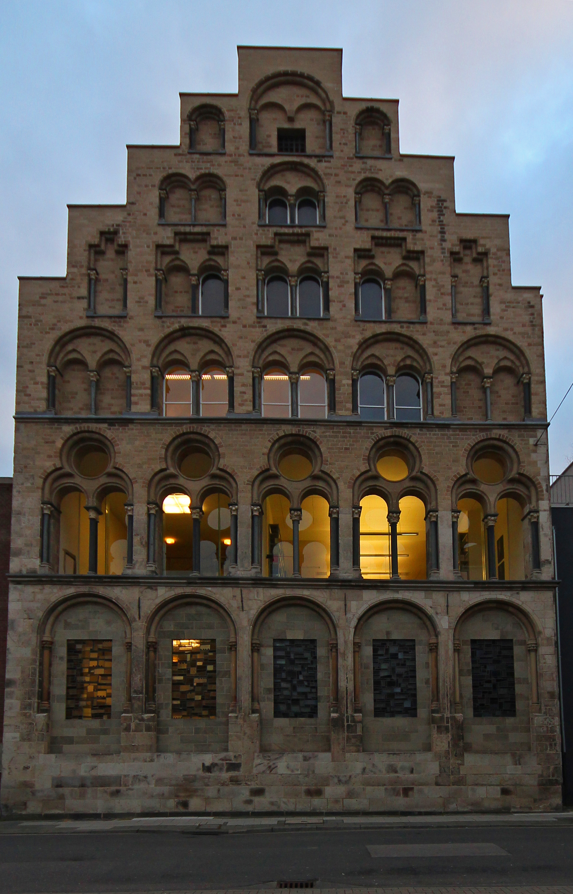 Das Overstolzenhaus in der südlichen Innenstadt Kölns in der Rheingasse.